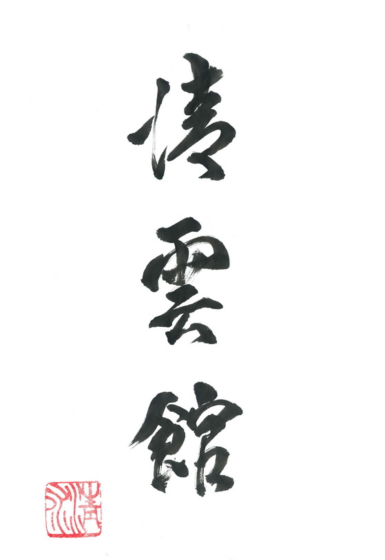 Srpski (latinica): "Seiunkan" je ime novosadskog Tendorju aikido kluba, a kaligrafija je delo i poklon Sensei Kenđi Šimizua koji je 2012. godine imenovao novosadski klub.